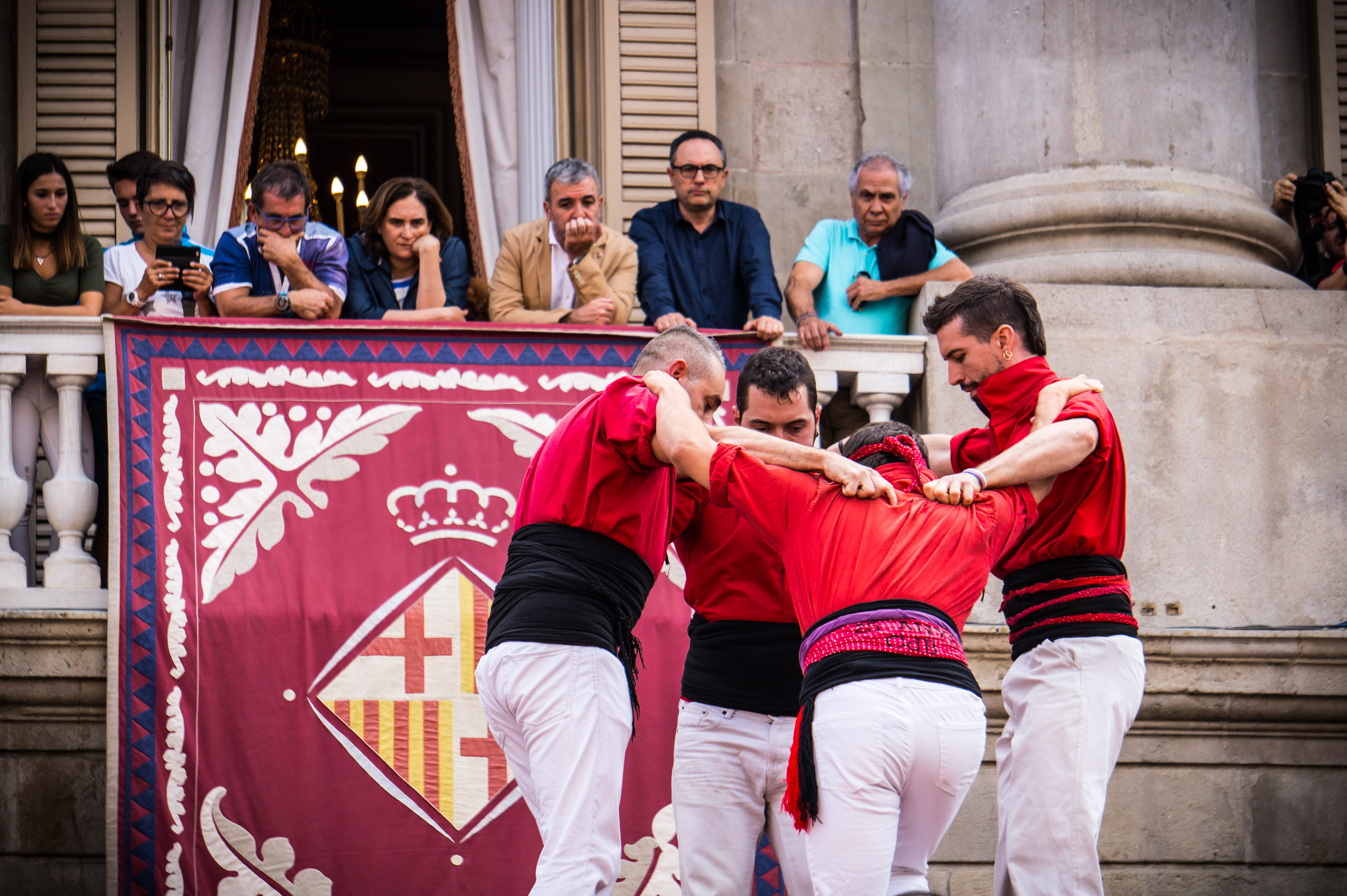 Actuación "castellera" delante del Ayuntamiento de Barcelona. Fiestas de Nuestra Señora de la Merced 2017. This is a photography of a Folklore festival in Spain (Wikidata id Q3181317).